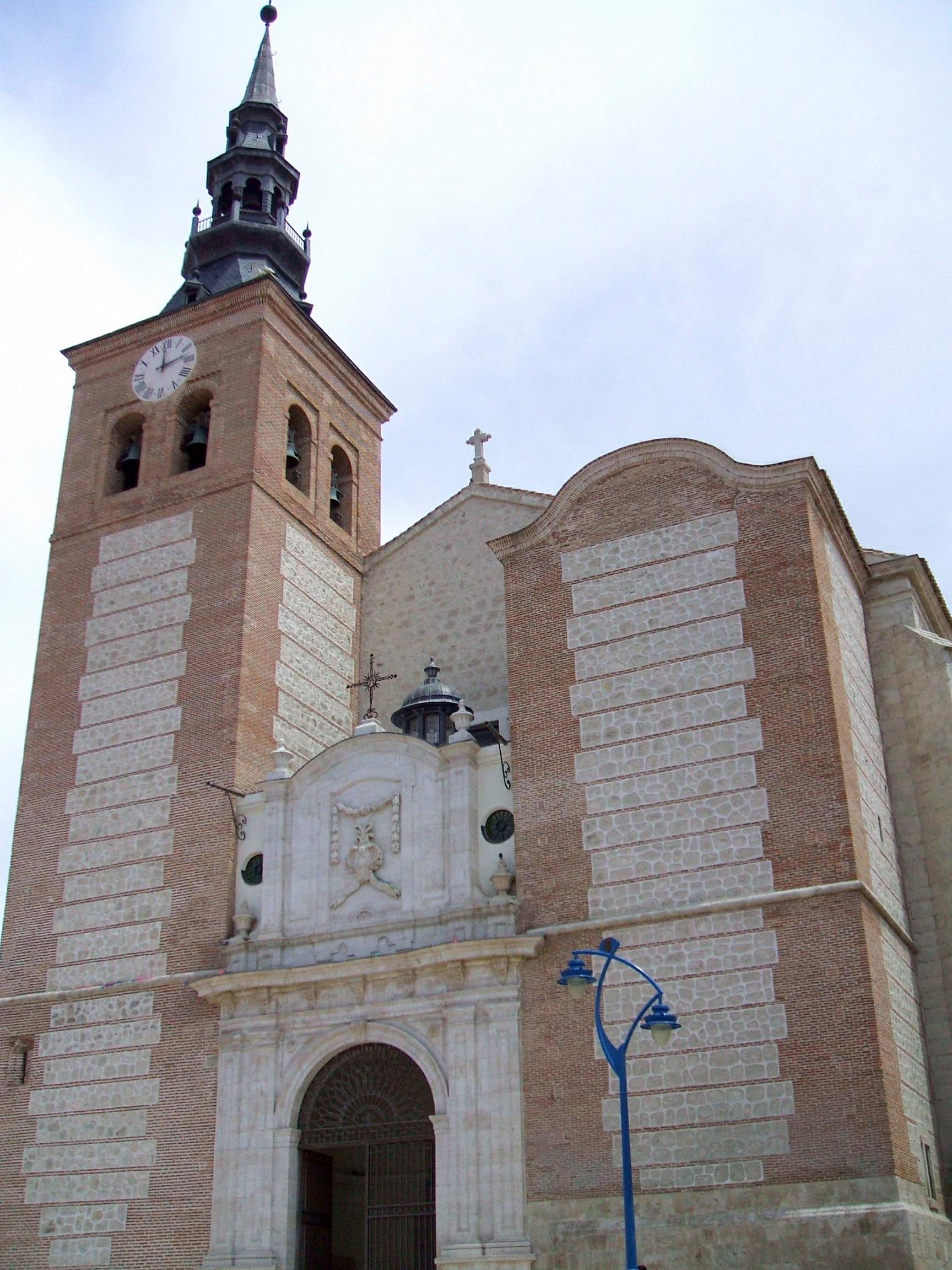 Getafe - Catedral de Nuestra Señora de la Magdalena